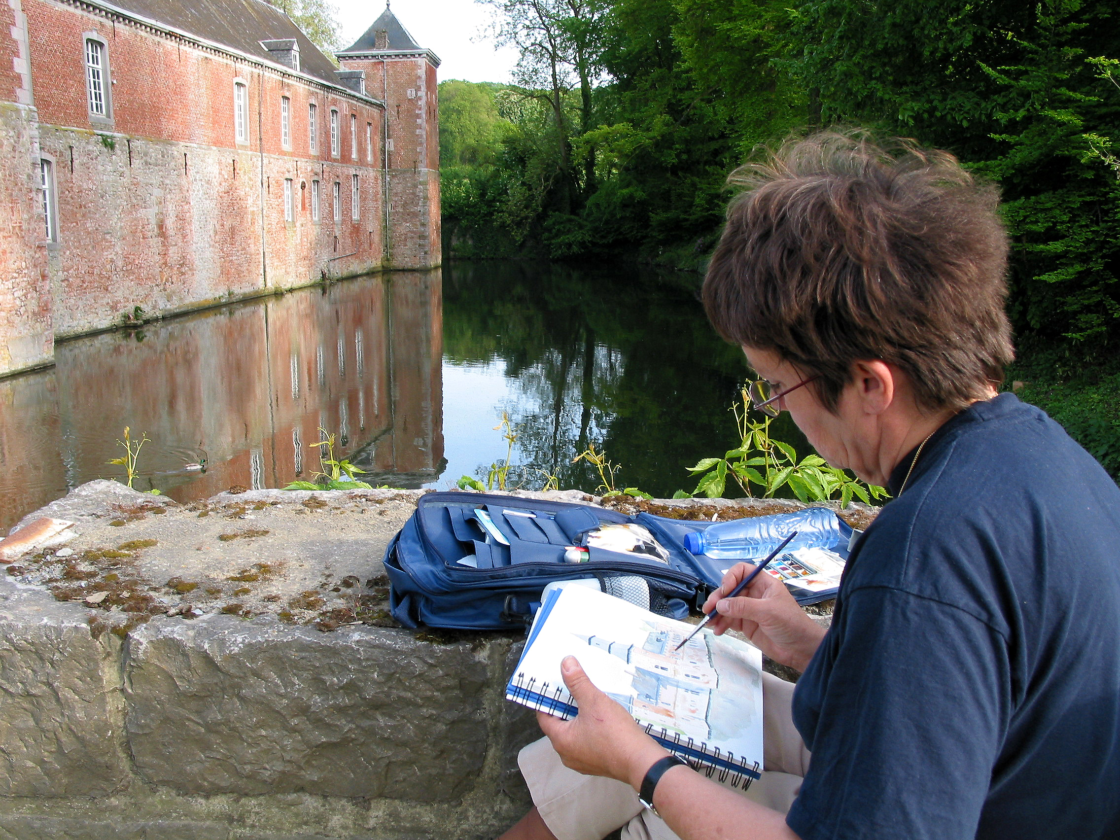 L'aquarelliste Marie-Claire Lefébure sur le terrain.